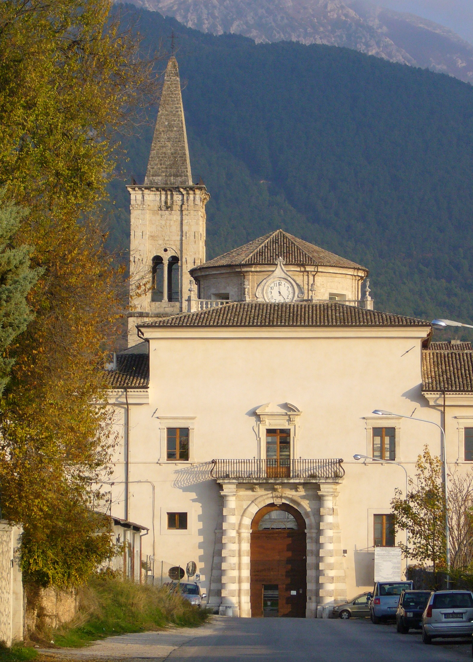 Badia